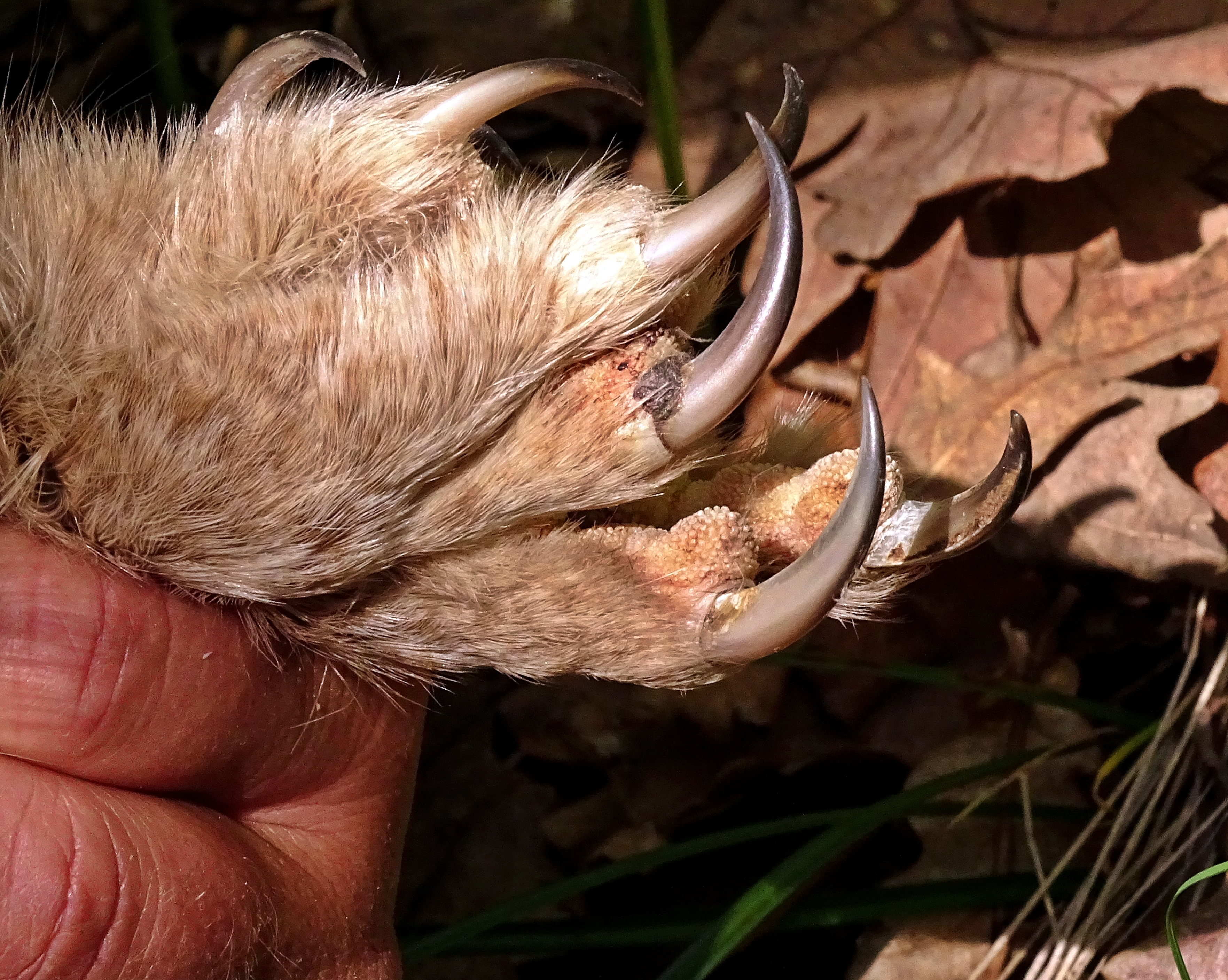 Srpski (latinica): Dugorepa sova (Strix uralensis) je gnezdarica očuvanih, mešovitih listopadnih, retko četinarskih šuma u brdsko-planinskim predelima. Najbolja staništa se nalaze u Jugozapadnoj Srbiji, ali je prisutna i na istoku zemlje. Na Tari je najčešća vrsta sove, ali je beležena i na Zlataru, Jadovniku, Goliji, Goču i Kopaoniku. U Vojvodini se gnezdi jedino na Vršačkim planinama. Procenjuje se da je populacija u malom porastu tokom poslednje tri decenije. Stanarica je.